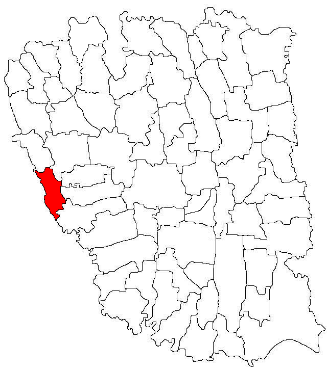 Categorie:Hărţi ale judeţului Galaţi